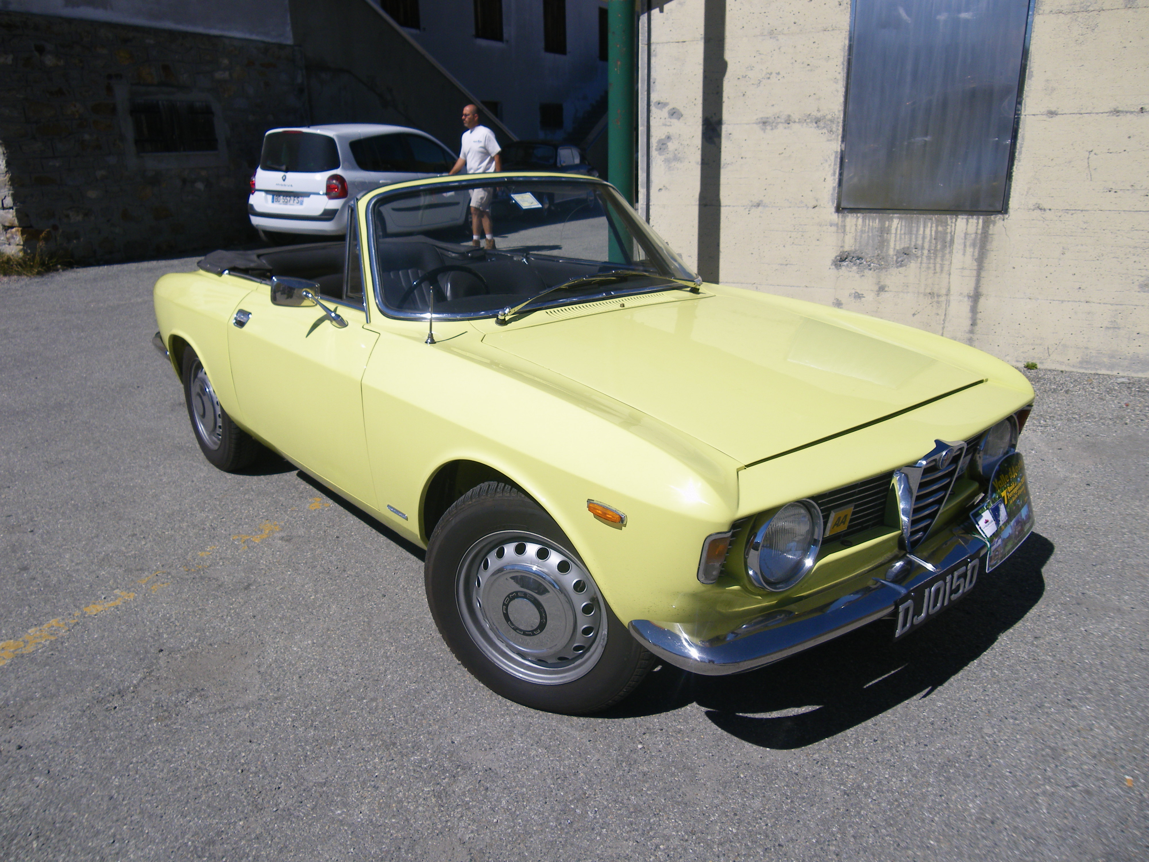 alfa romeo de collection au col du petit saint bernard